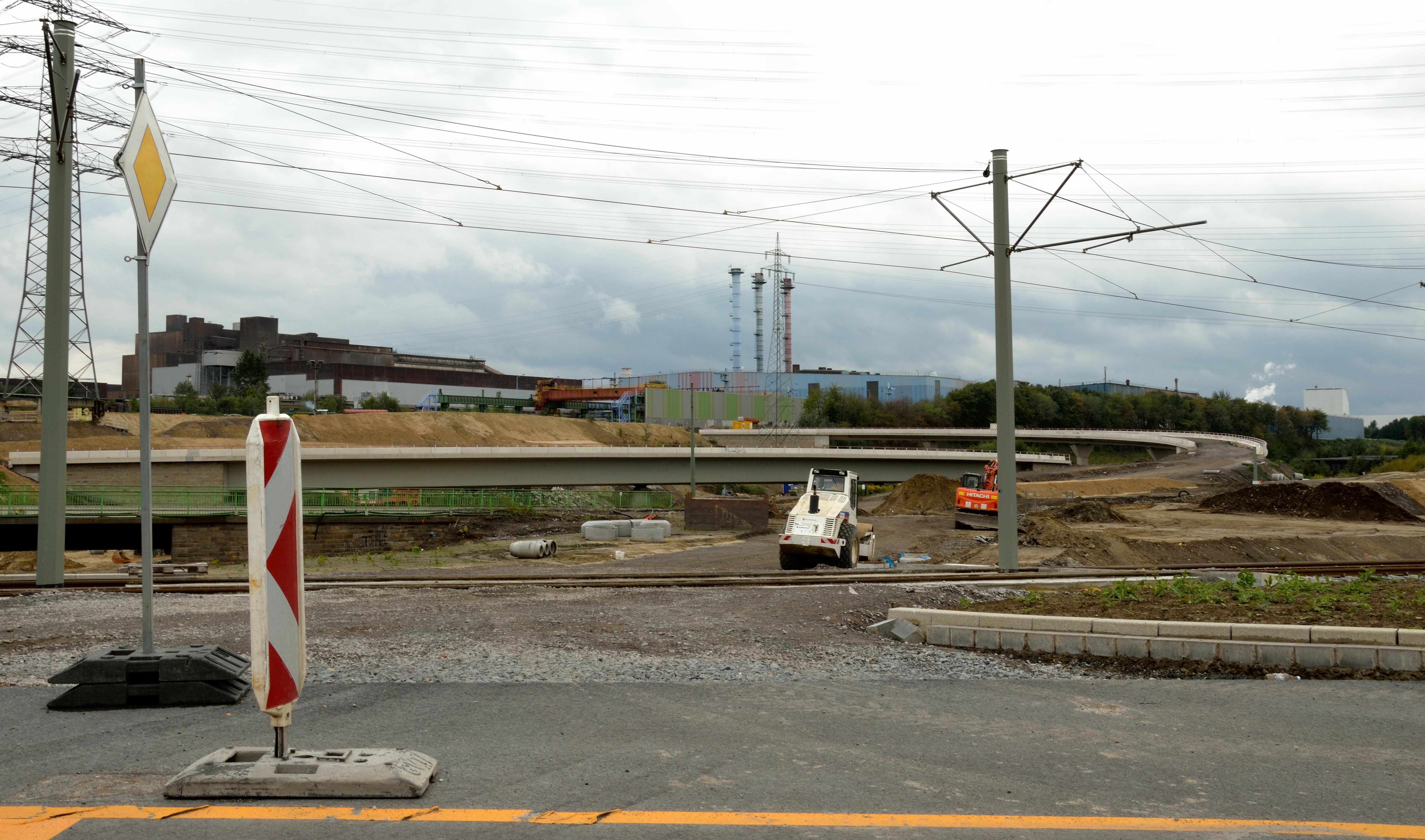 Baustelle des Westkreuzes in Bochum